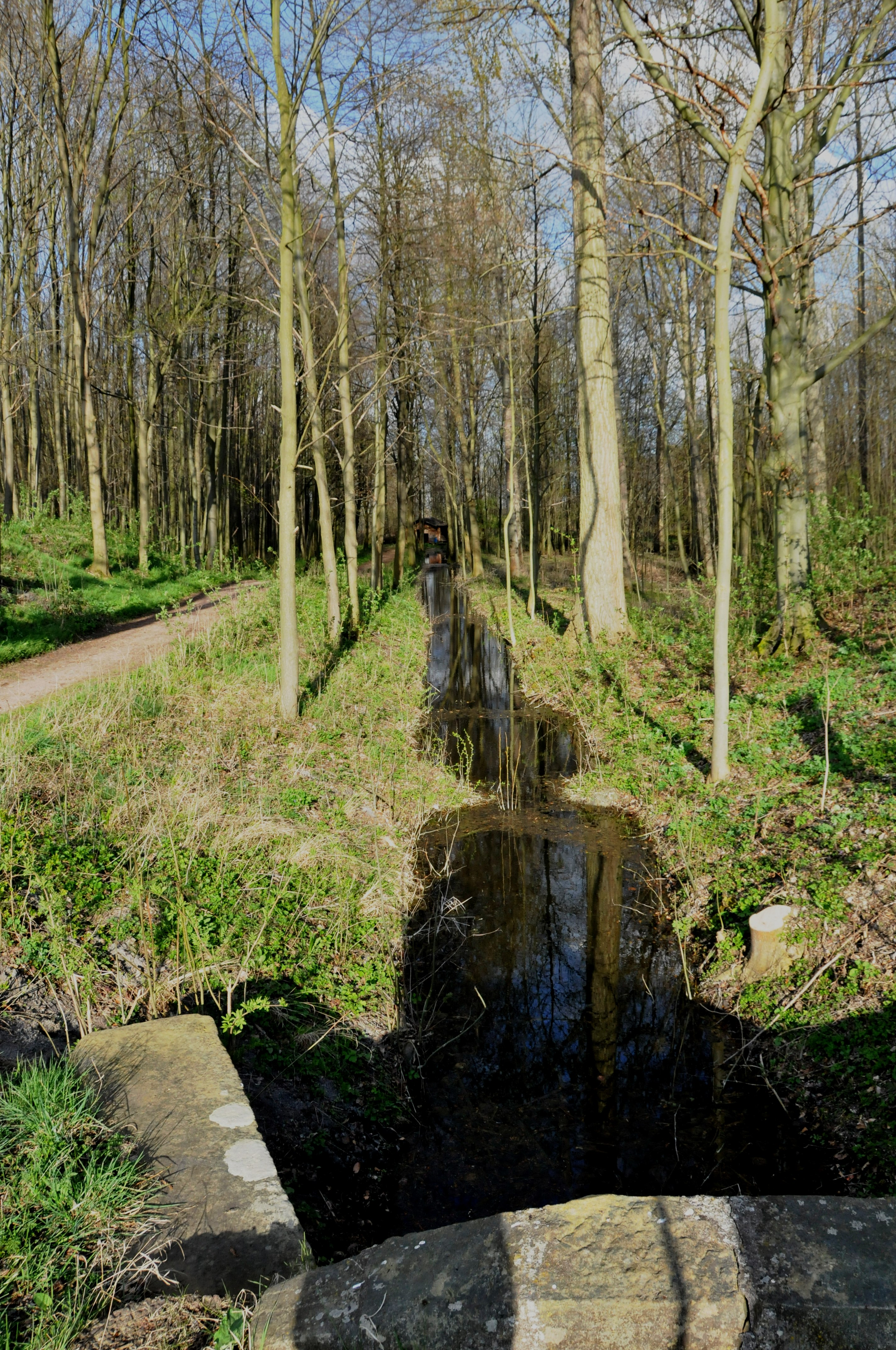 Wasserlauf zum Rot-Vorfluter